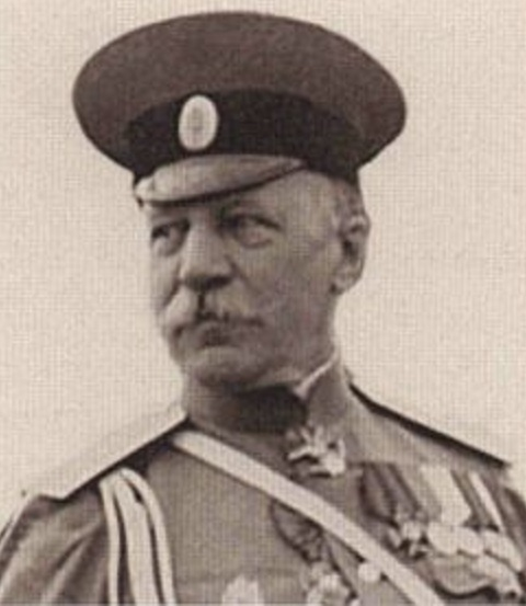 Генерал Михаил Иванович Шишкевич.